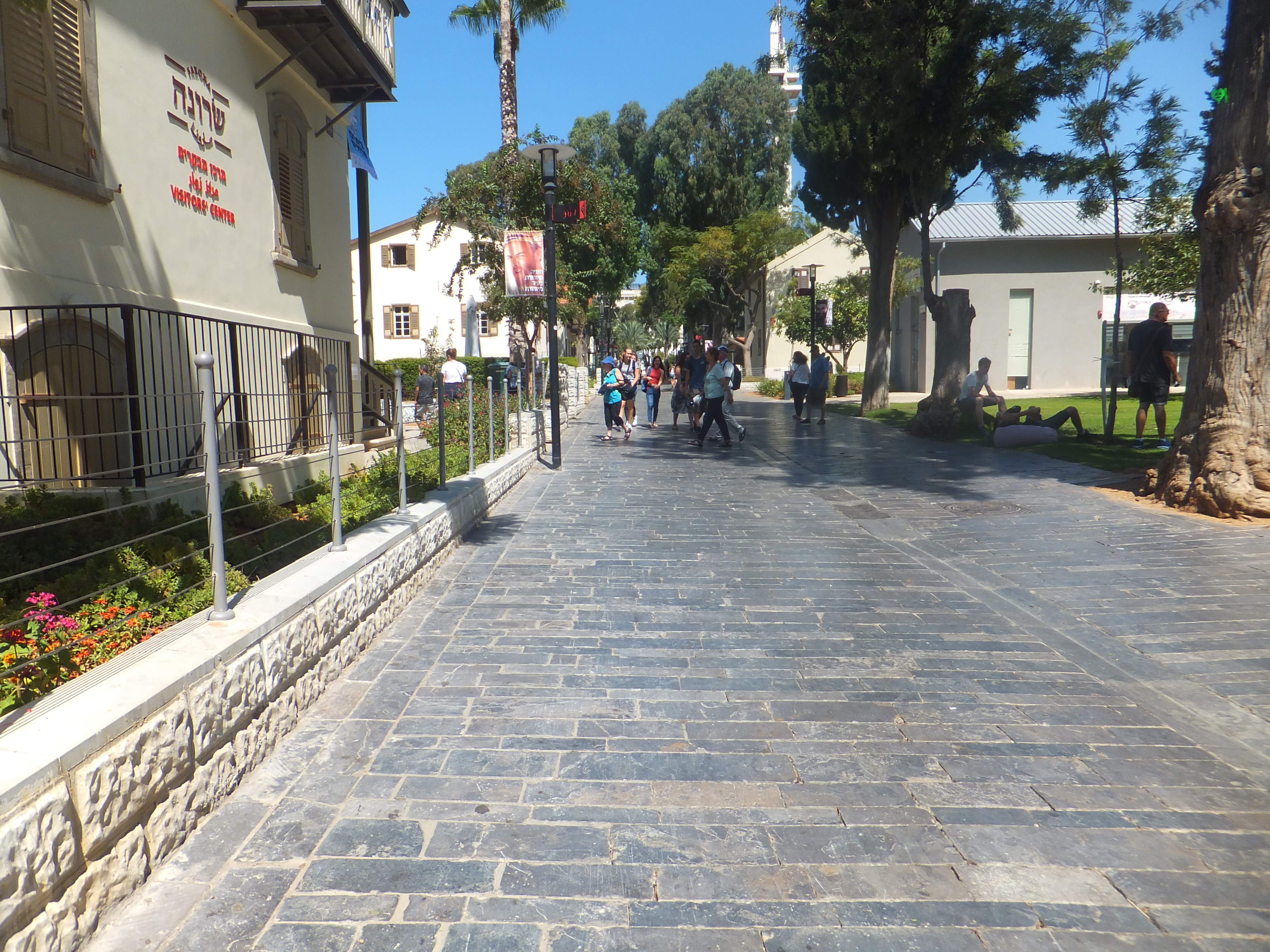 שׂרונה היא המושבה הרביעית שהקימו הגרמנים הטמפלרים בארץ ישראל במחצית השנייה של המאה ה-19. המושבה הוקמה ארבעה קילומטרים צפונית ליפו, ואחרוני בתיה שוכנים כיום בתל אביב בין שדרות שאול המלך מצפון, דרך בגין במזרח, רחוב הארבעה מדרום, ומגרשי החנייה של אחוזות החוף ממערב. מקצתם נמצאים היום בתוך בסיס הקריה.